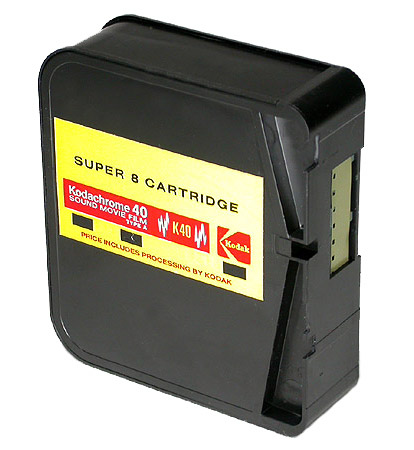 cartucho sonoro de súper 8